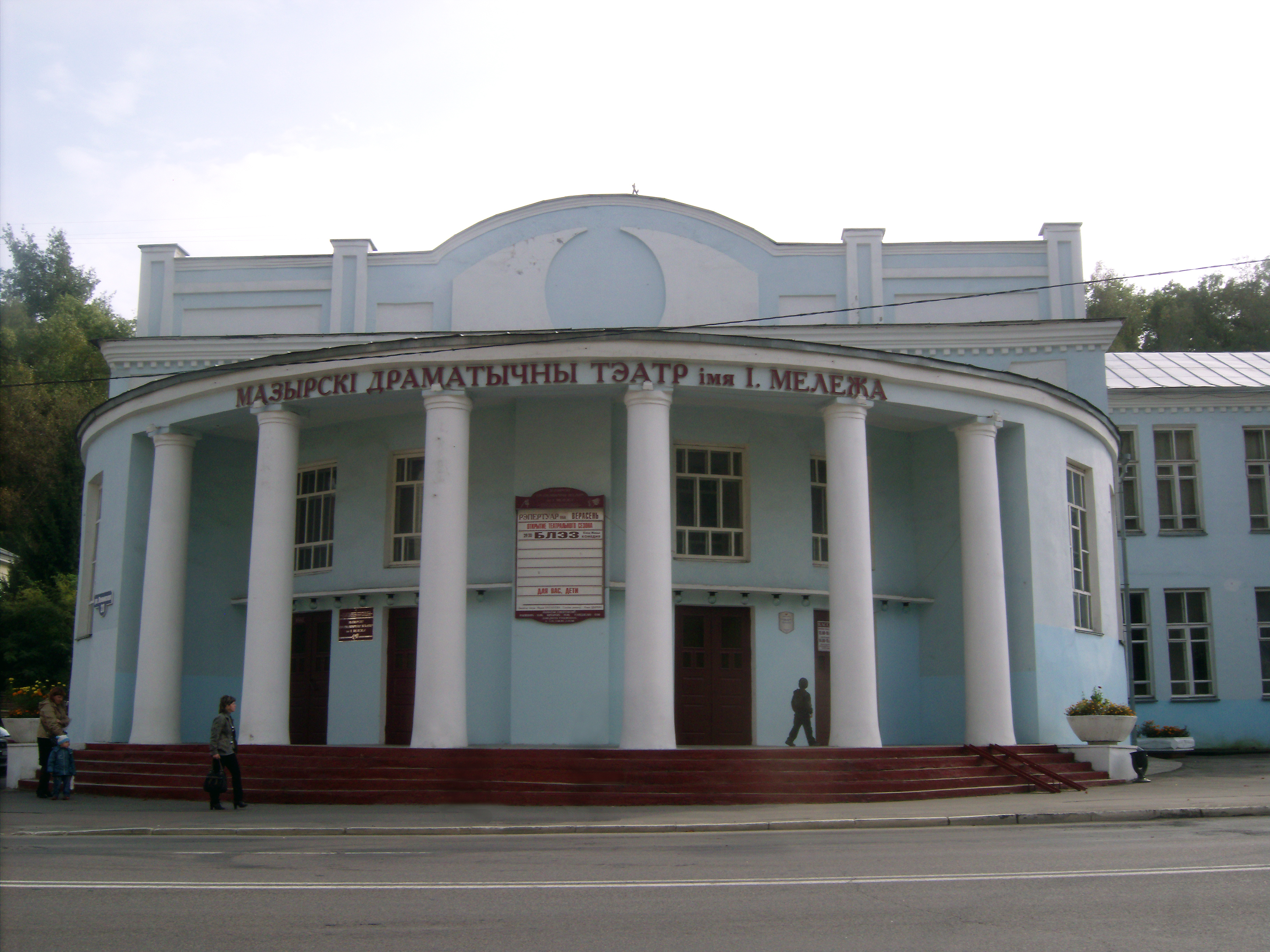 Будынак драматычнага тэатру. г. Мазыр This is a photo of Belarusian heritage monument. Reference number: 313Г000513 ( WLM)